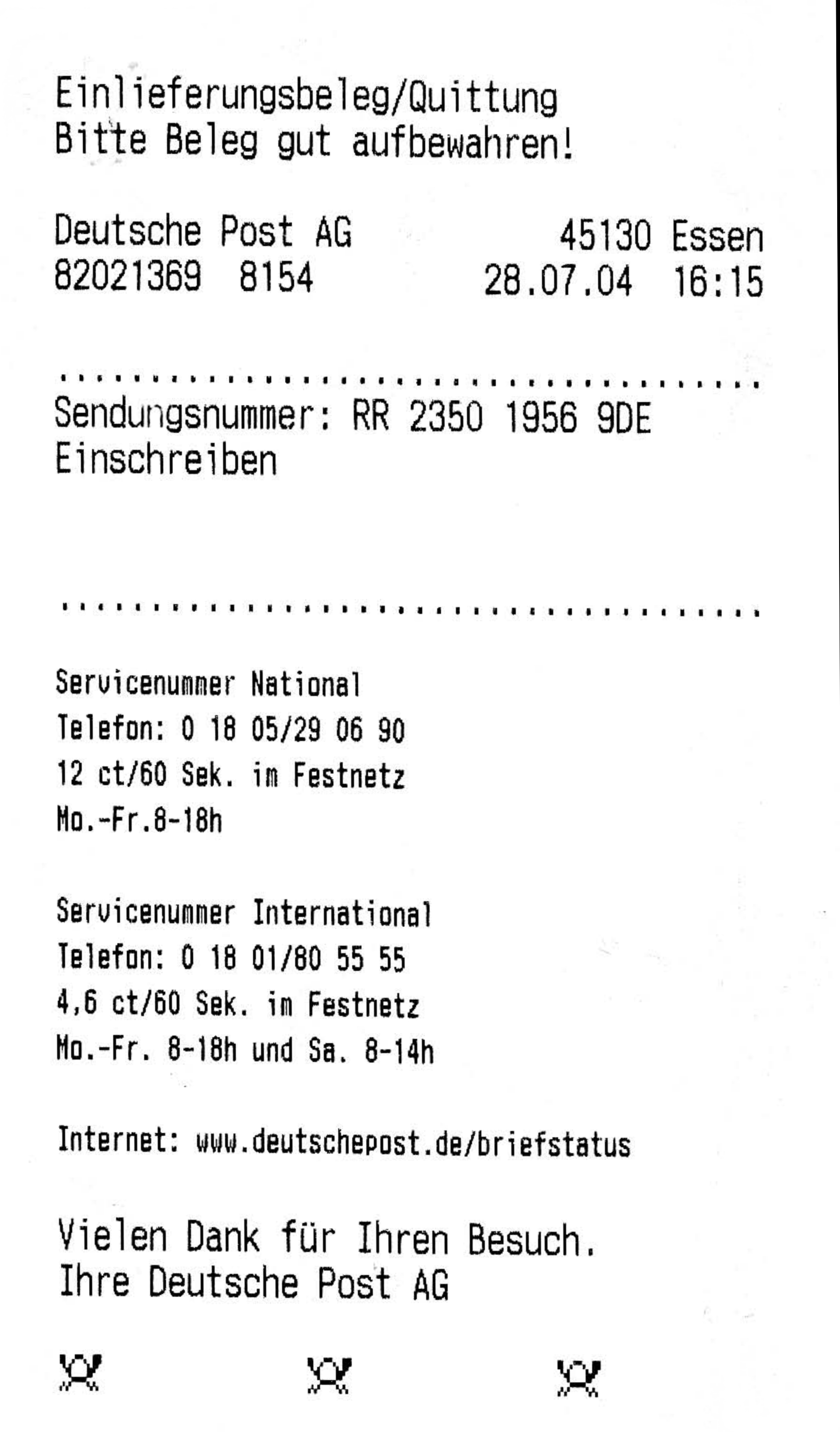 Deutsche Post - Einlieferungsbeleg Einschreiben